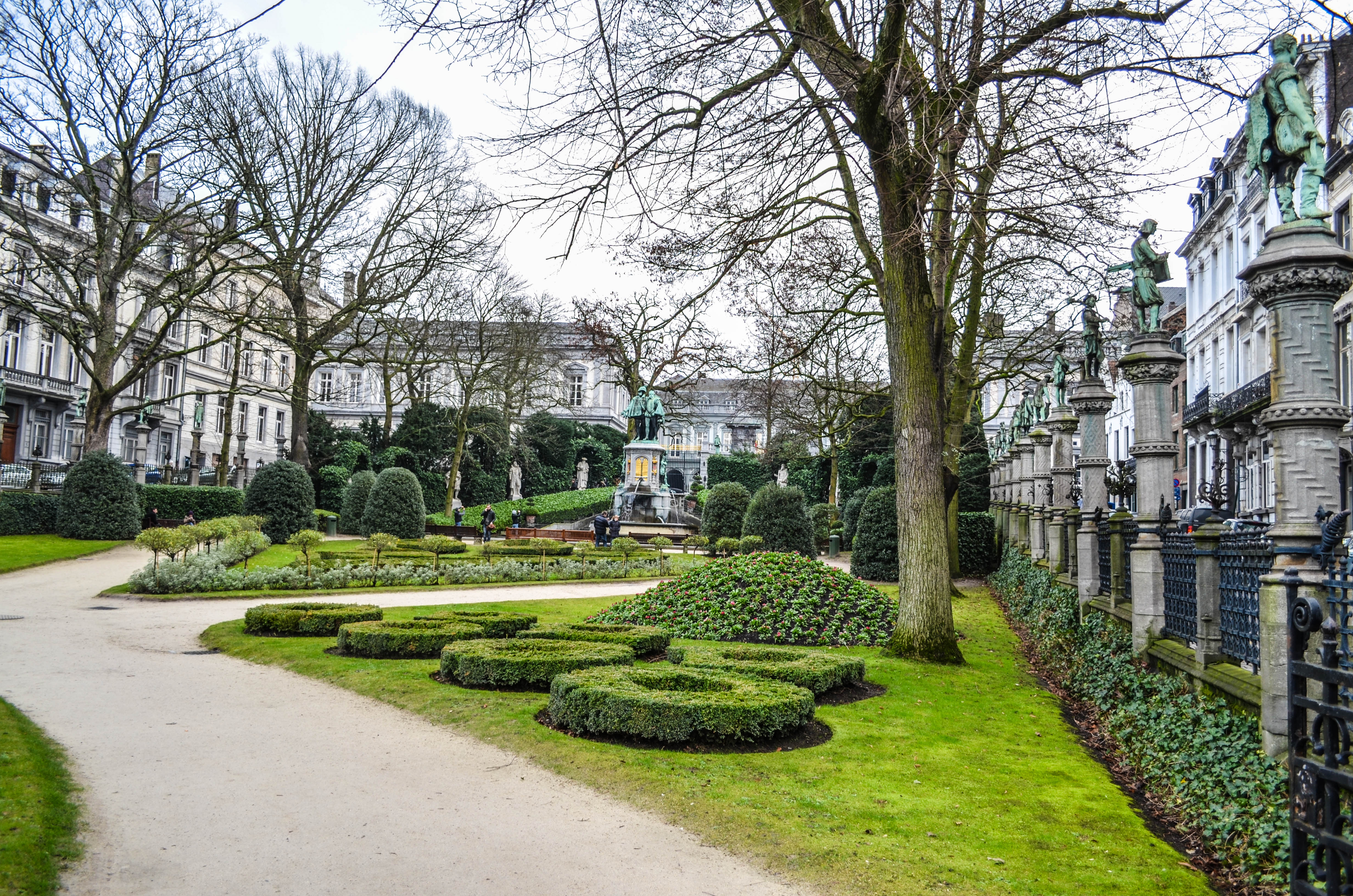 Bruxelles, square du Petit Sablon